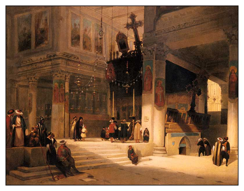 l'intérieur d'une église à Constantinople, peut-être Agios Demetrios à Kuruçeşme.title QS:P1476,fr:"l'intérieur d'une église à Constantinople, peut-être Agios Demetrios à Kuruçeşme." label QS:Lfr,"l'intérieur d'une église à Constantinople, peut-être Agios Demetrios à Kuruçeşme."